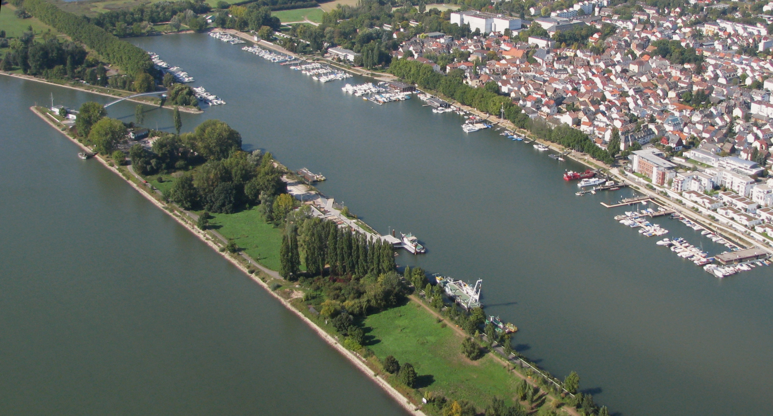 Wiesbaden Luftbild Schiersteiner Hafen Yachthafen Hafenfest Rhein Foto 2008 Wolfgang Pehlemann Wiesbaden IMG_0254